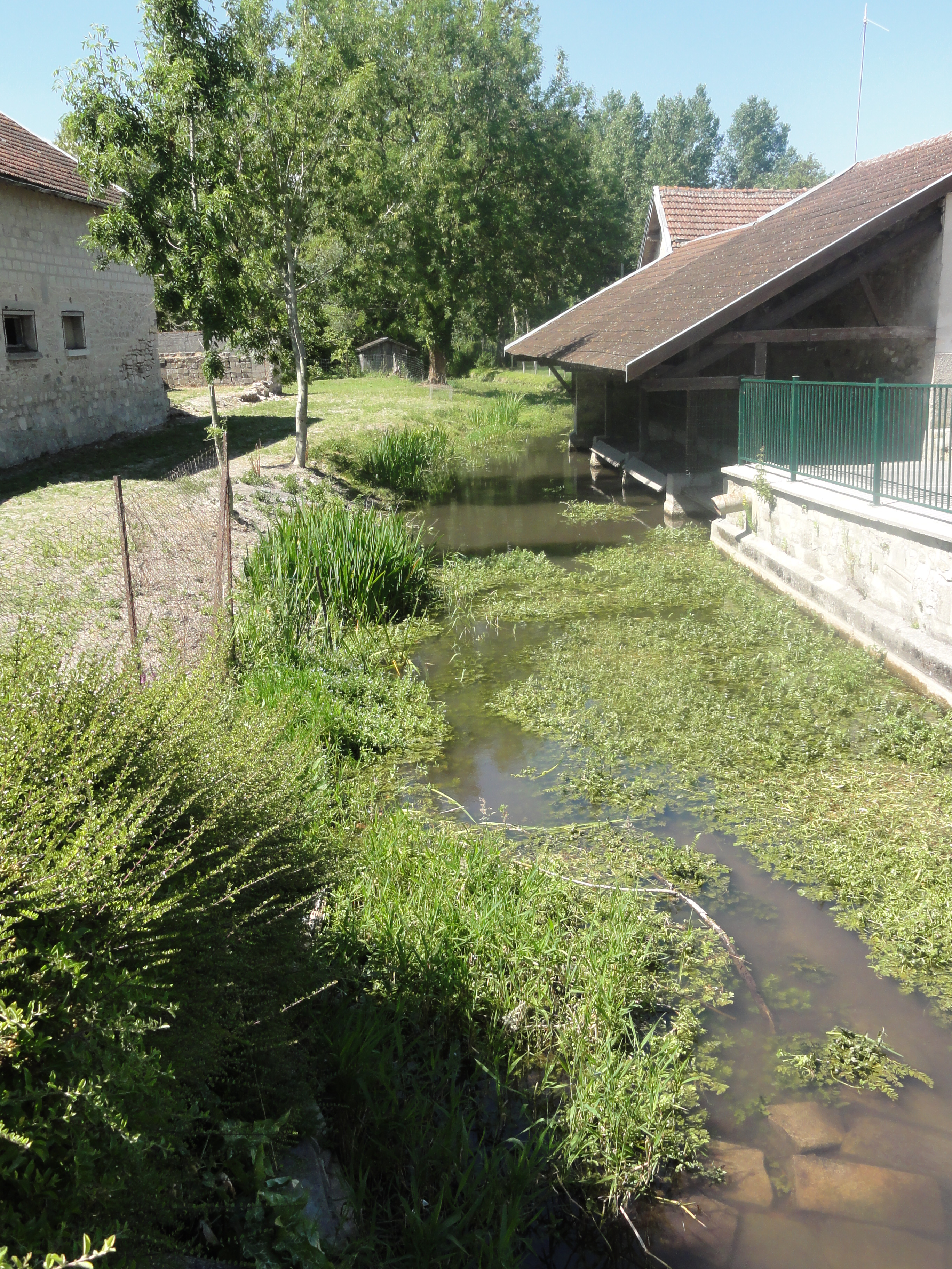 Juvincourt-et-Damary (Aisne) La Miette avec lavoir